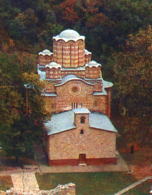 Le monastère orthodoxe serbe de Ravanica a été fondé en 1177 par le prince Lazar Hrebeljanović